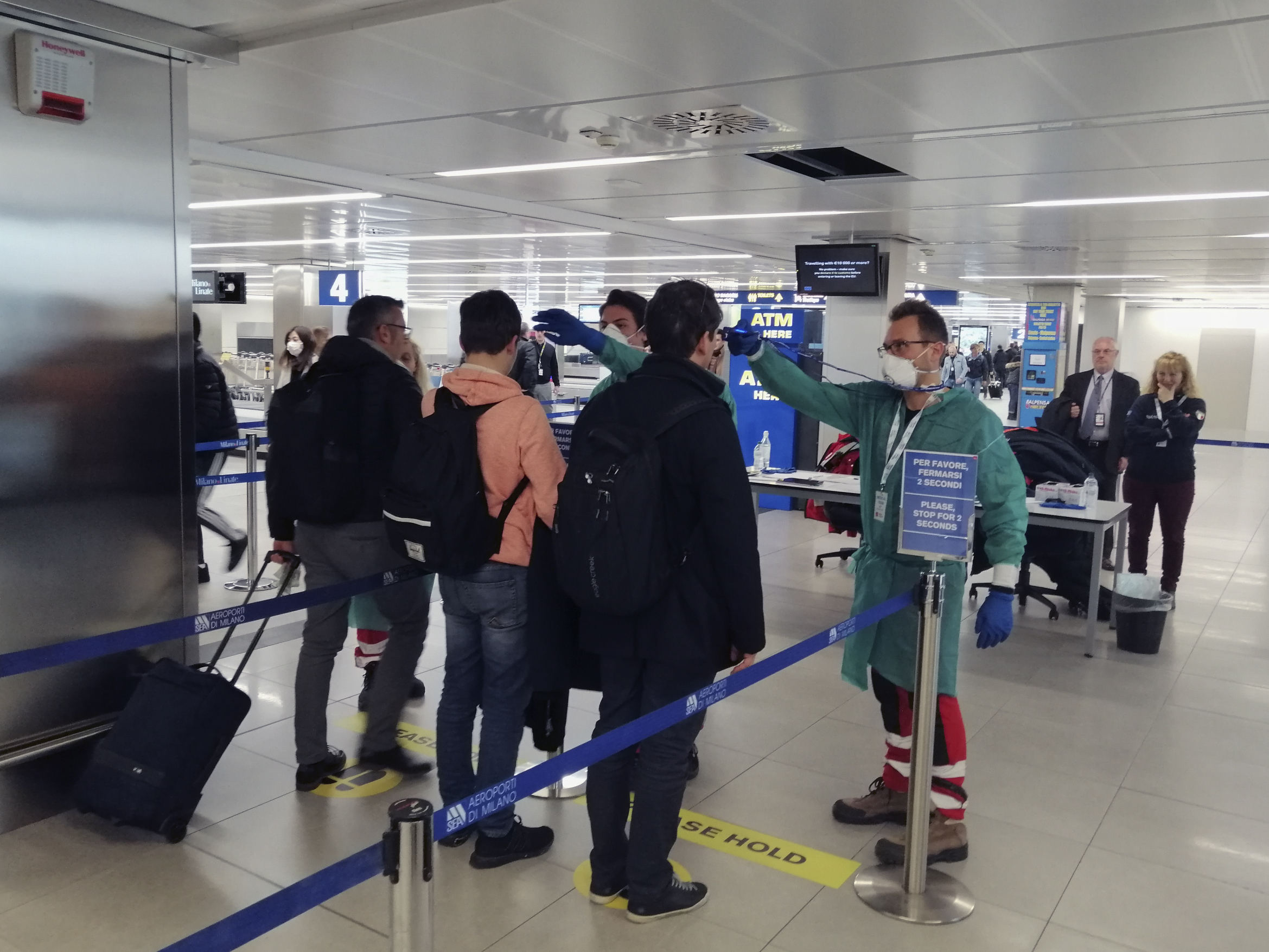 Milano, 6 febbraio 2020 – Volontari di protezione civile impegnati nei controlli sanitari all'aeroporto "Milano Linate".